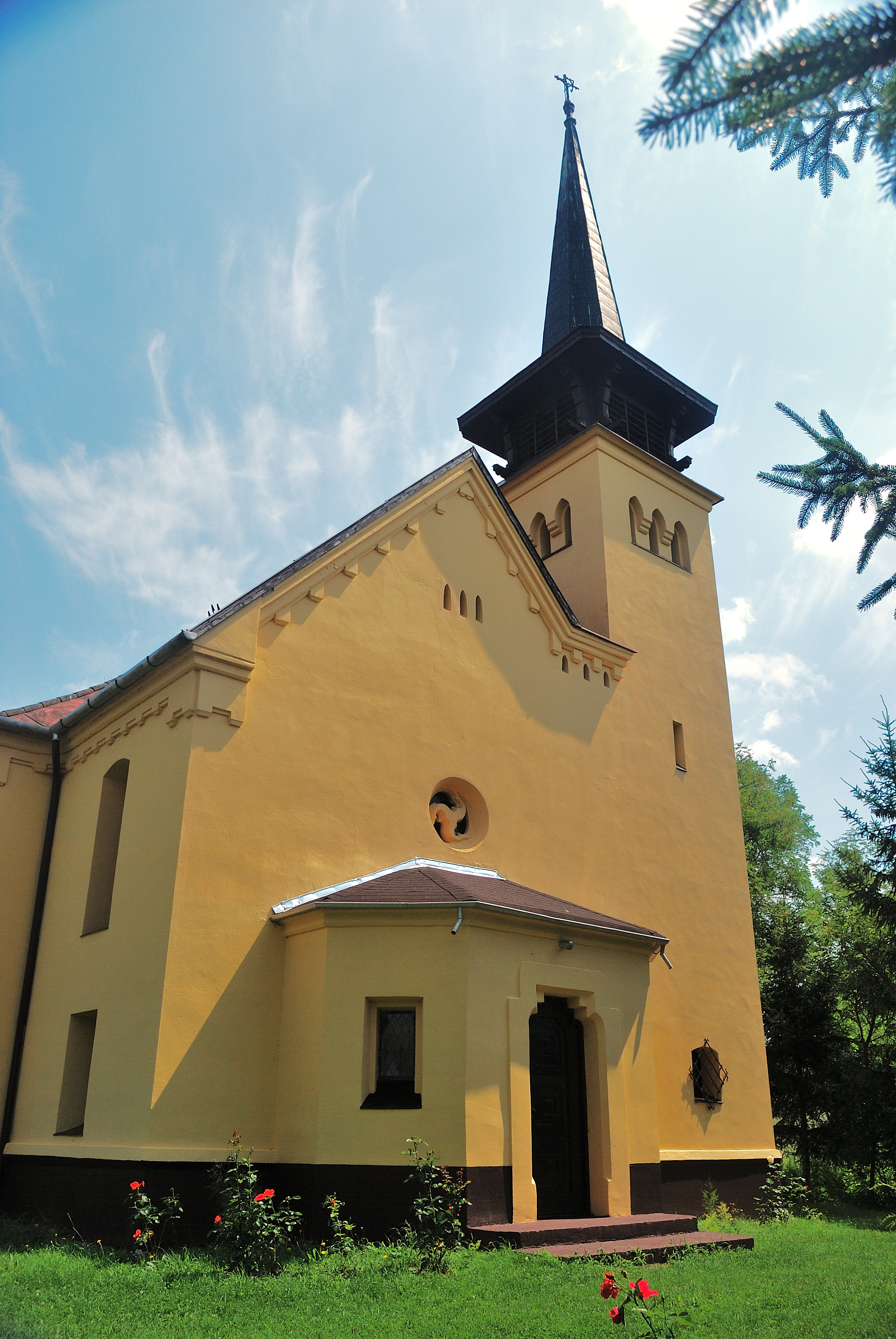 Zabari Magyarok Nagyasszonya római katolikus templom